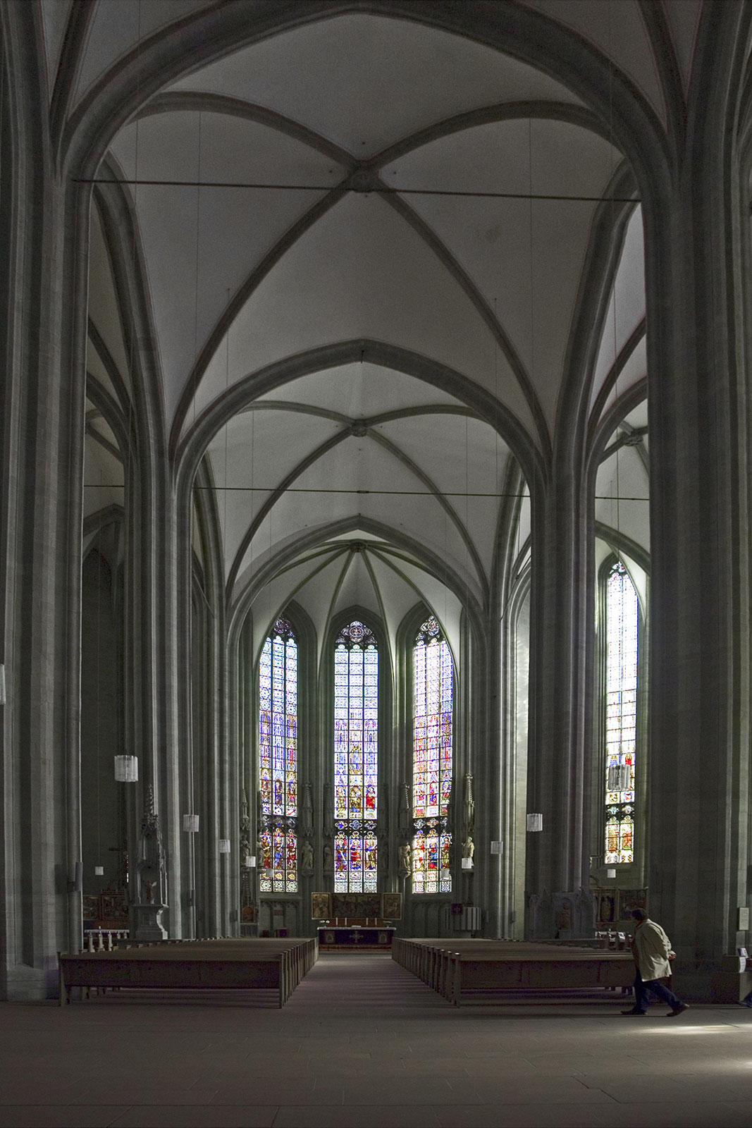 Soest, Maria zur Wiese, Mittelschiff